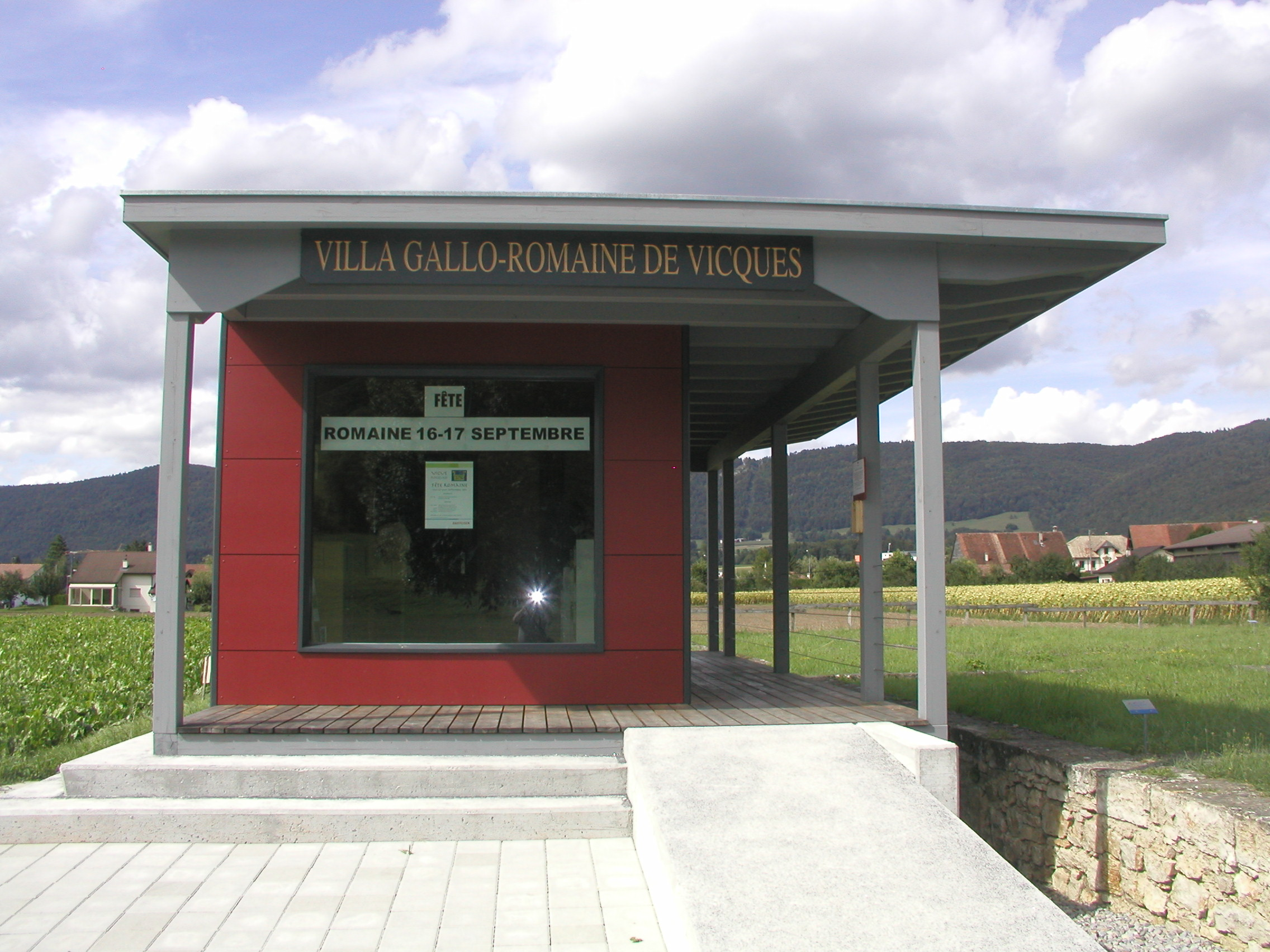 Römische Villa